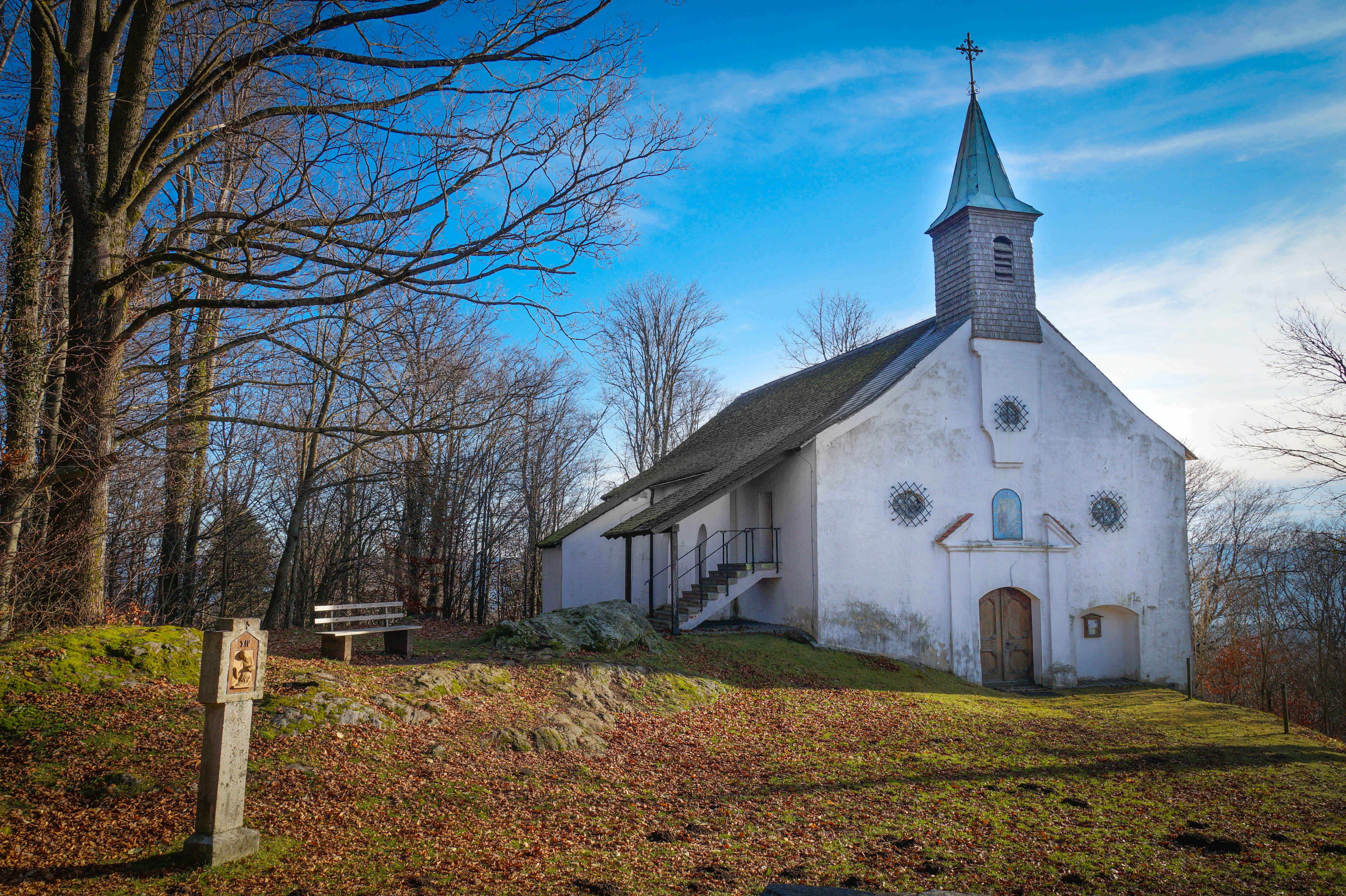 Wallfahrtskirche Sankt Ulrich auf Burgstall Haidstein, aufgenommen November 2019.